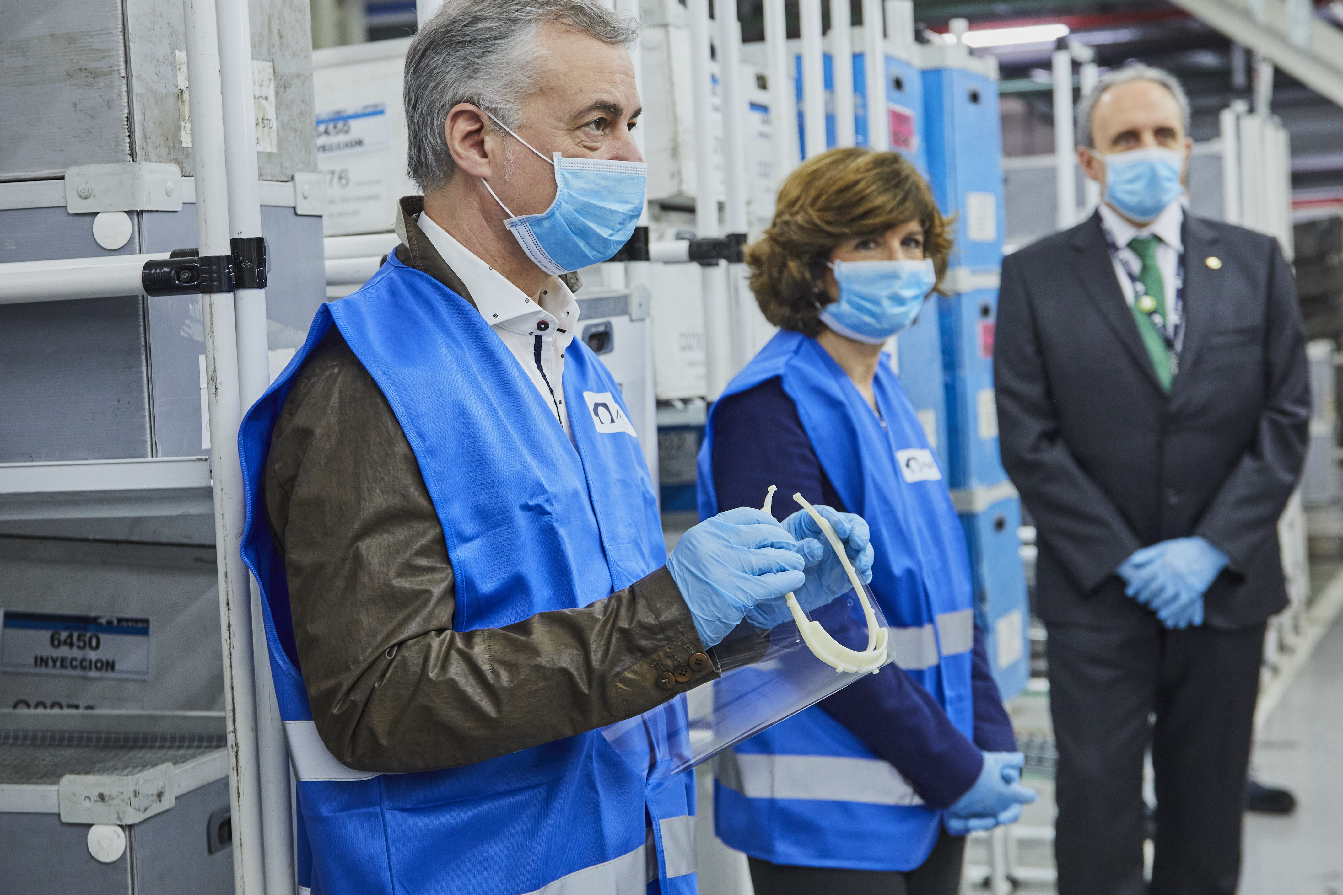 Iñigo Urkullu eta Nekane Murga Maier enpresa bisitatzen, non Covid-19 pandemiaren garaian babes-biserak ari diren egiten. Lehendakria eta Osasun sailburua lehen aldiz maskarekin jantzita publikoki.